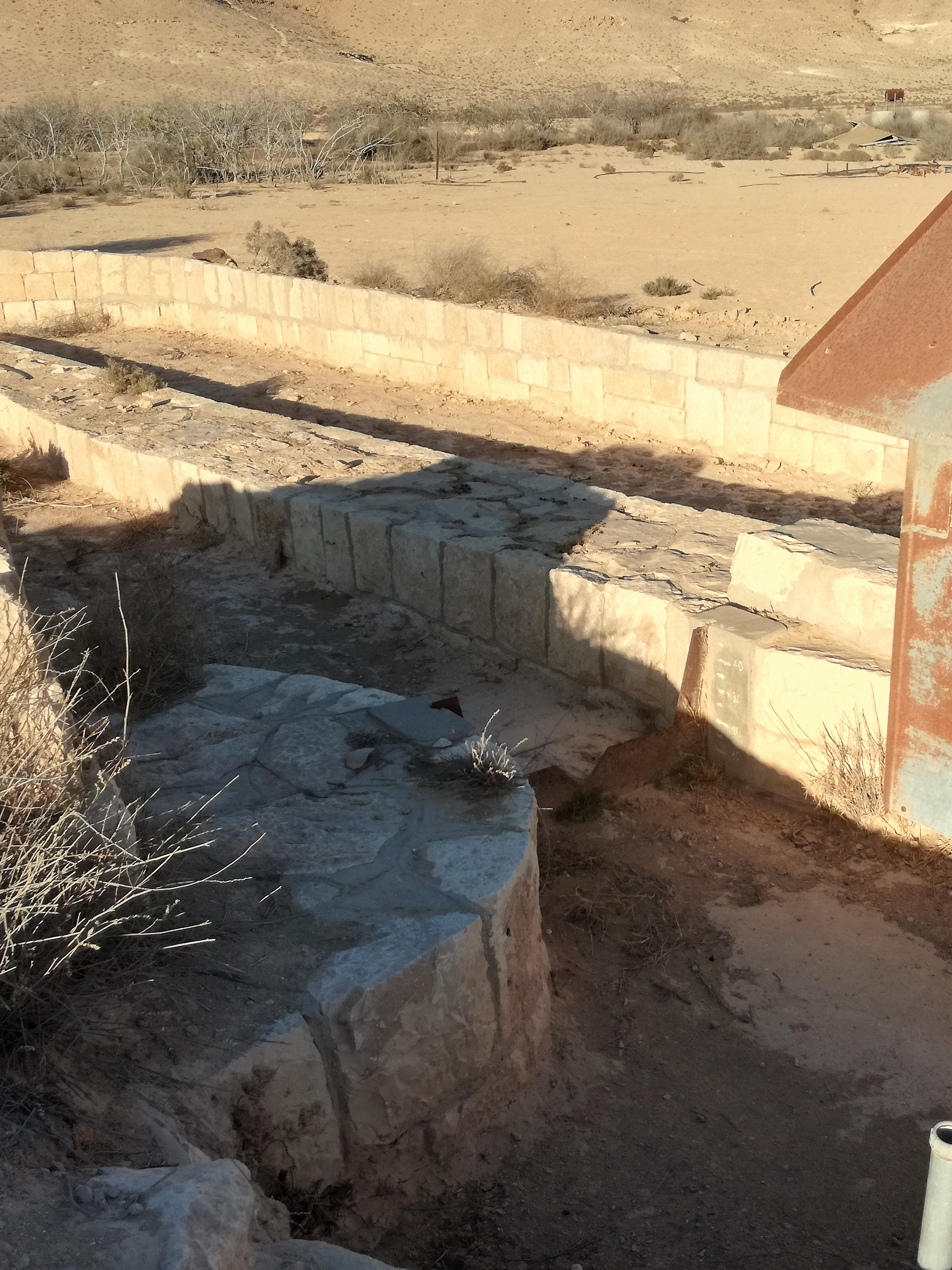 מערכת המים בחוות עבדת